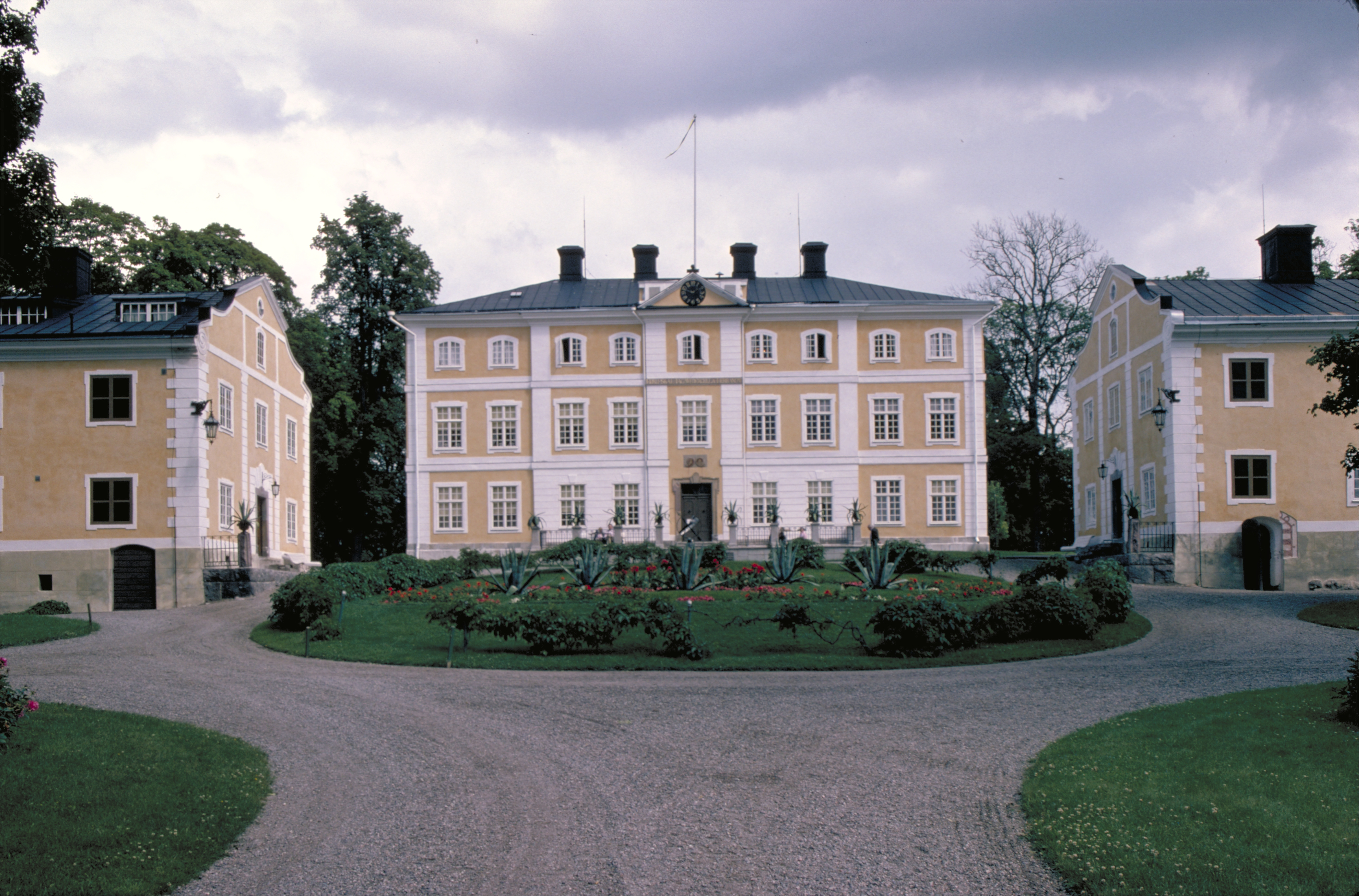 Exteriörbild av mangårdsbyggnaden och flyglarna. Motiv: Julita Nyckelord: Riksintressen Kategori: Herrgård Exteriörbild av mangårdsbyggnaden och flyglarna.